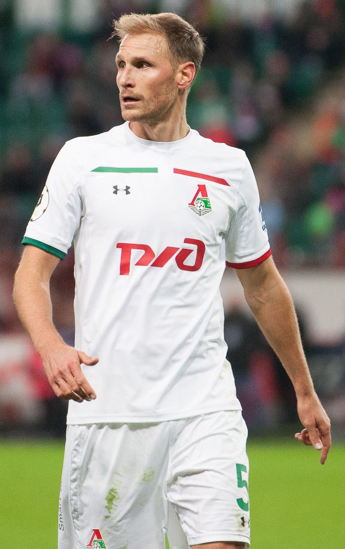 «Локомотив» в матче с «Ахматом» прервал трехматчевую серию без побед в РПЛ